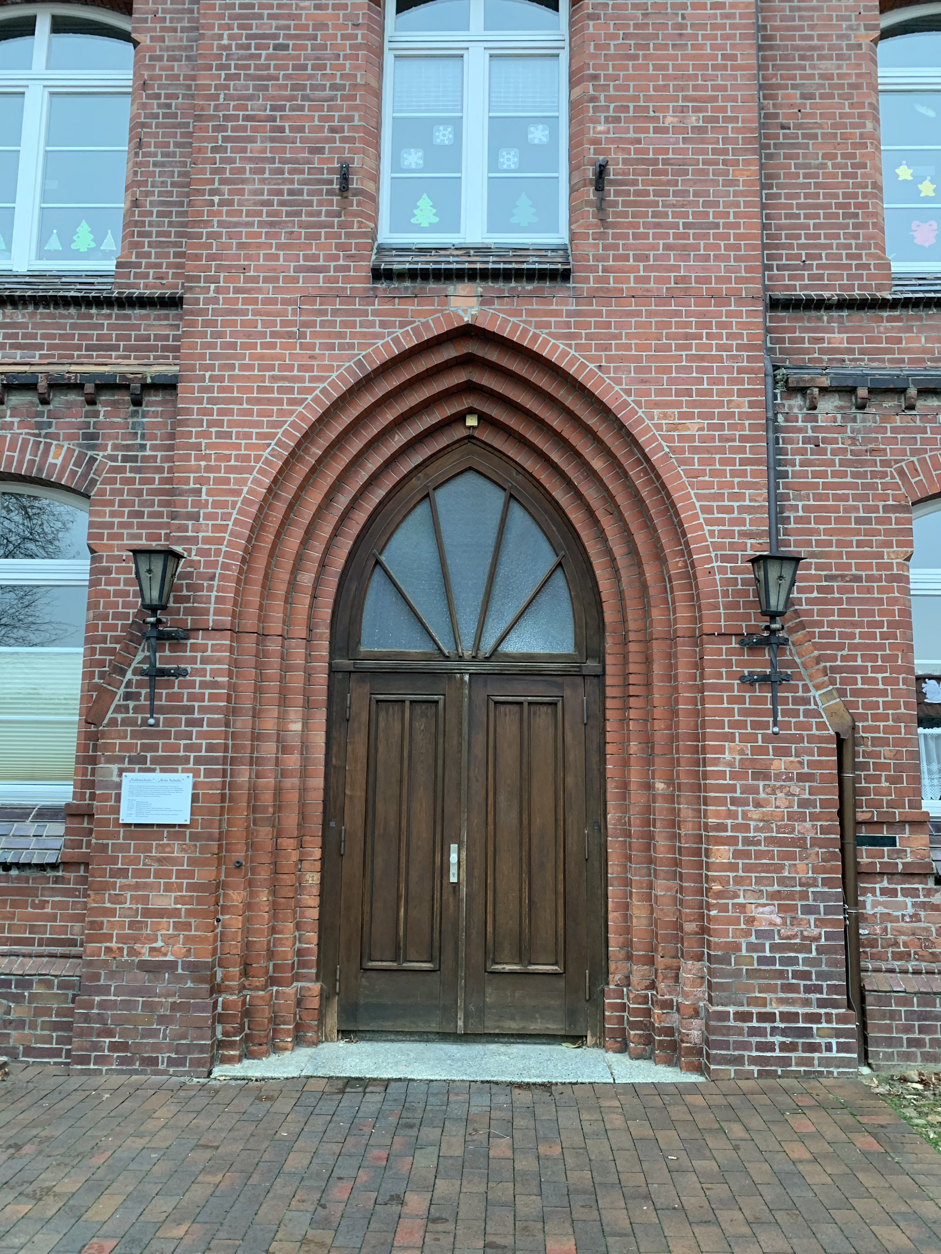 Die Rote Schule ist ein denkmalgeschütztes Gebäude in Strasburg (Uckermark) in Mecklenburg-Vorpommern. Sie wird im 21. Jahrhundert als Grundschule genutzt.